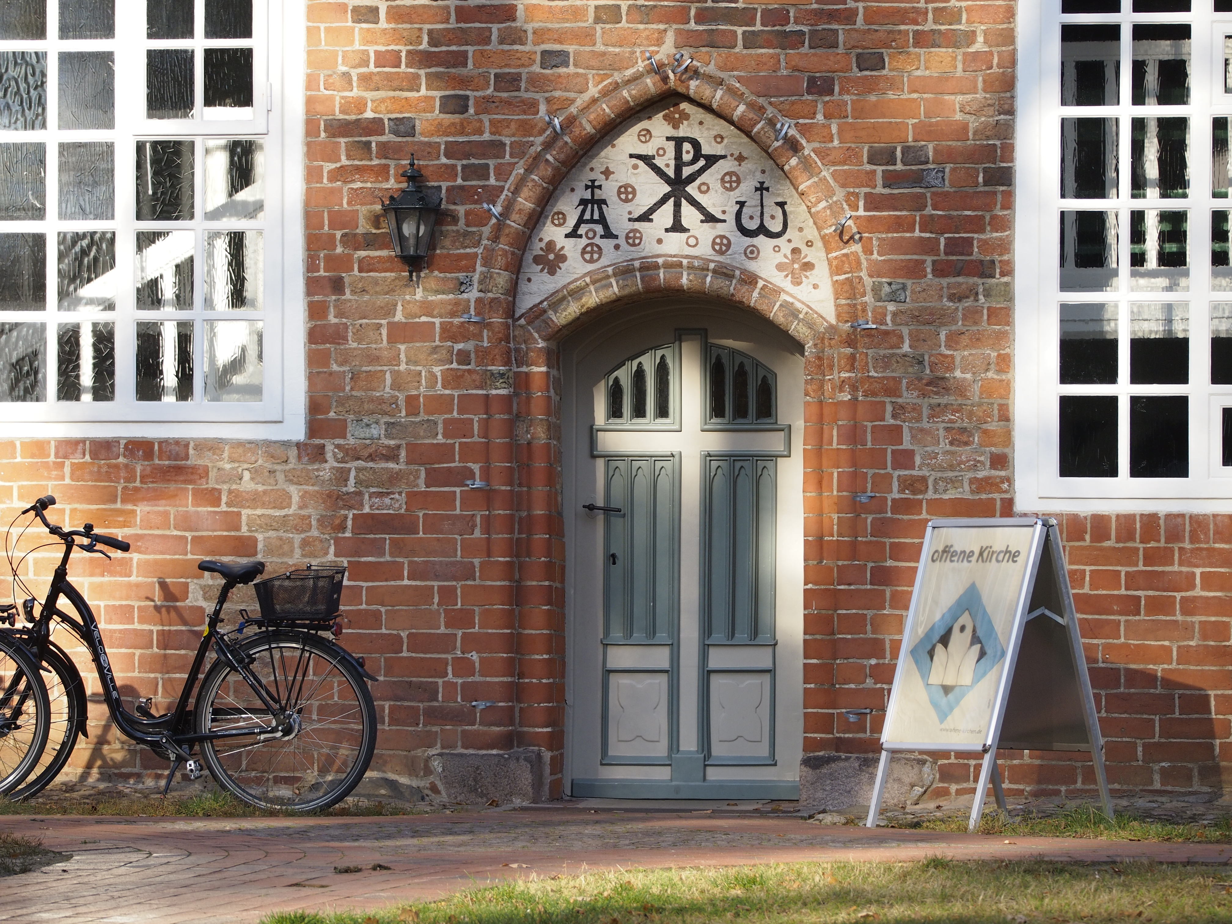 Eingang zur St. Laurentius-Kirche in Müden (Örtze), Niedersachsen